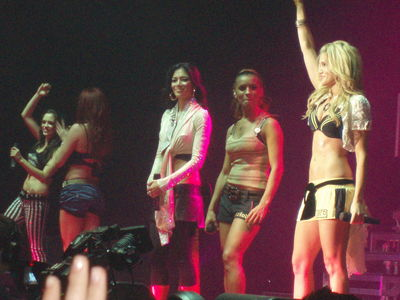 Beschreibung: The Pussycat Dolls am 18.11.2006 in Böblingen Quelle: selbst gemacht Datum: 21. November 2006 Autor: Julian Braun